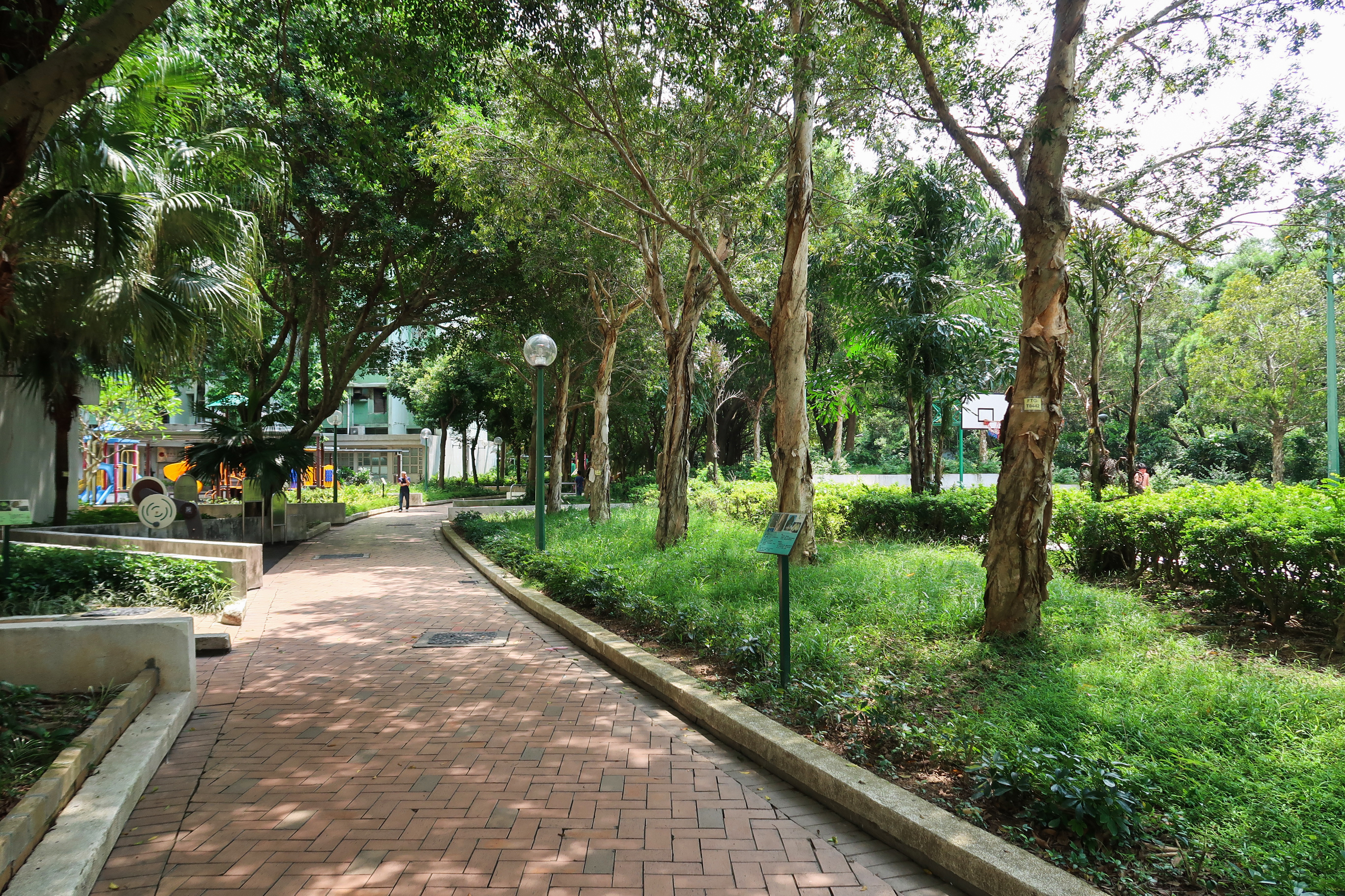 Fu Tung Estate Garden